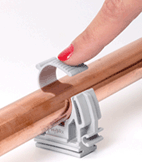 Abrazadera de plástico de fácil instalación.